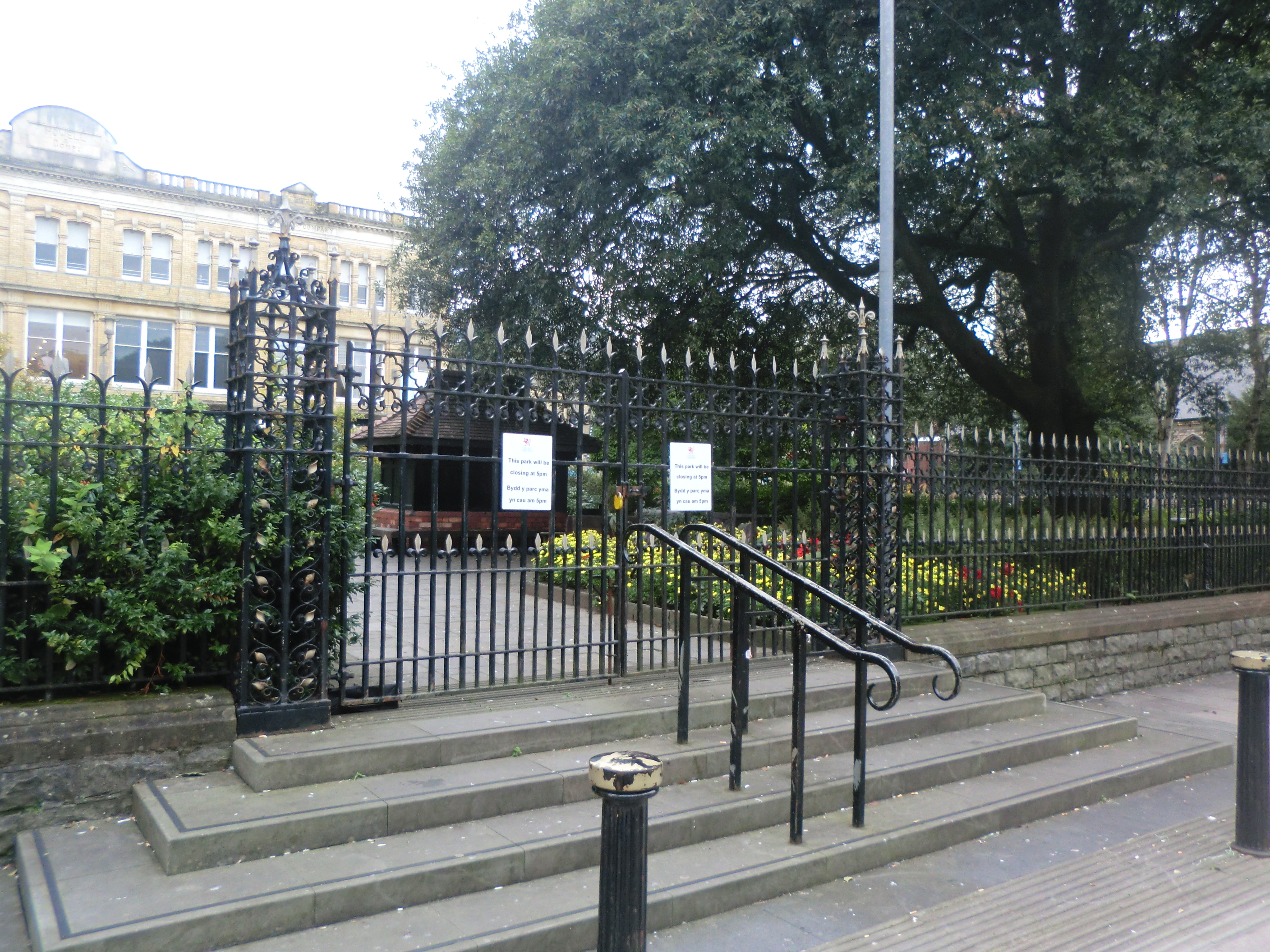 Eingangstor zum Park